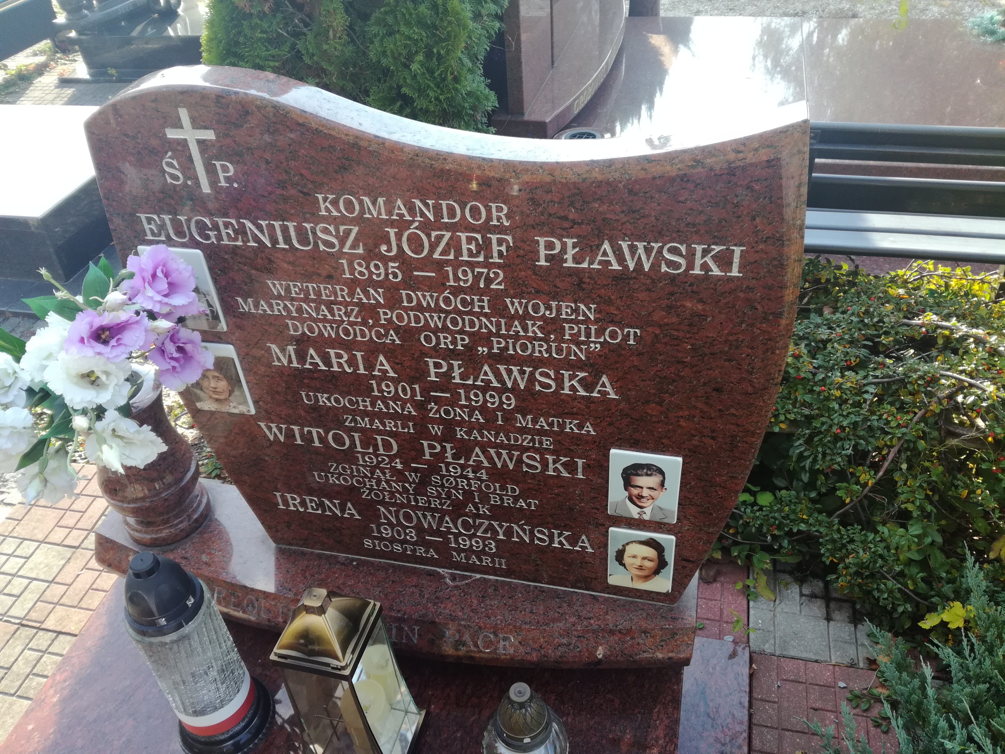 grób kmdra Eugeniusza Pławskiego na Cmentarzu Marynarki Wojennej w Gdyni